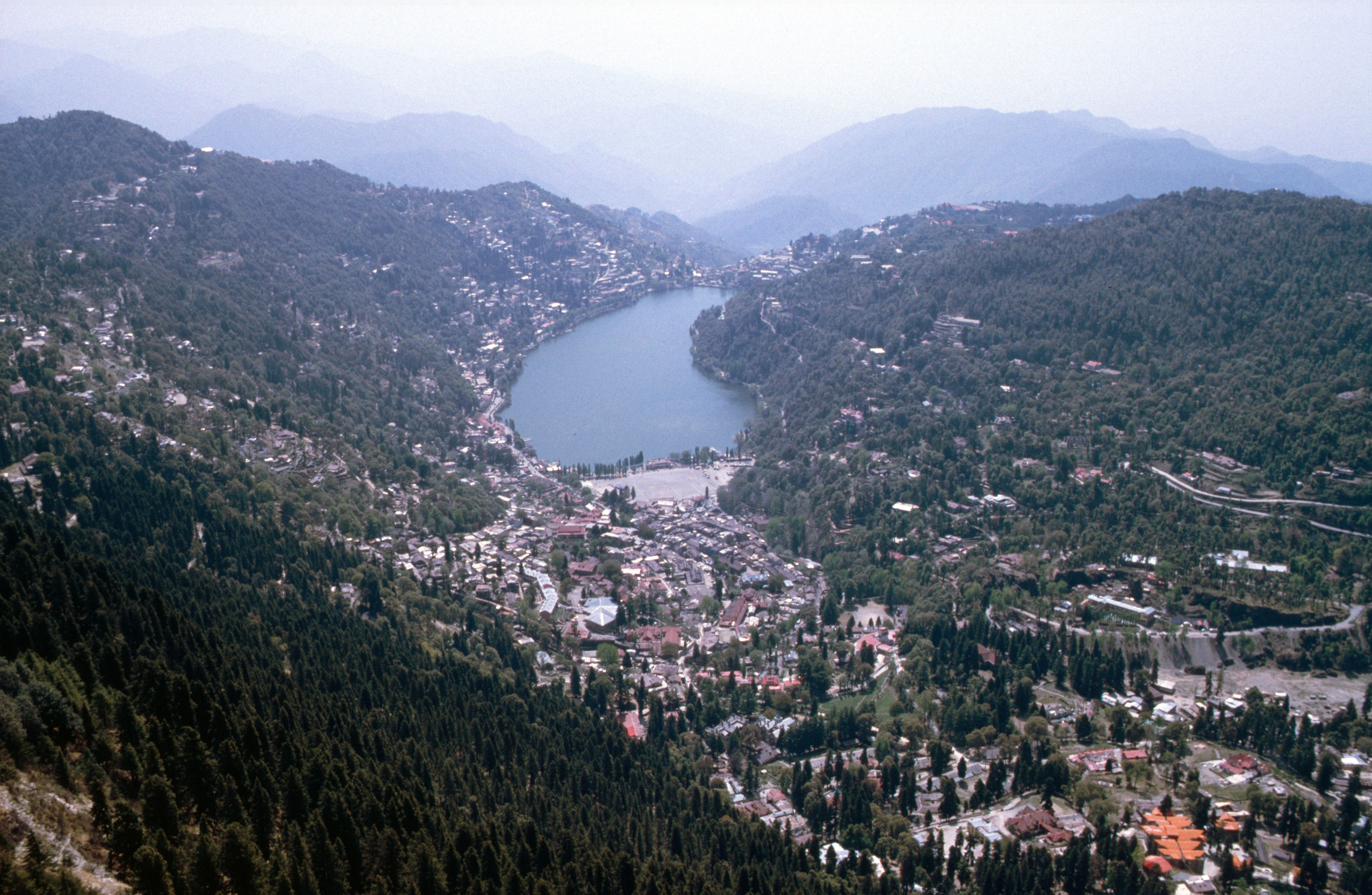 Der auf rund 2000m gelegene Ort Nainital